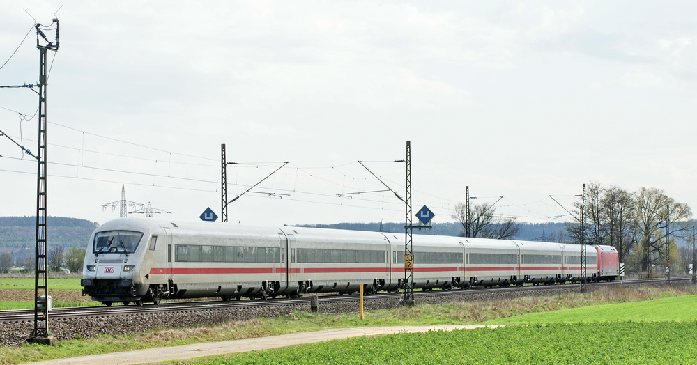 Metropolitan Zug 930 der Deutschen Bahn - Fernverkehr, der am 12.04.2012 bei Baiersdorf mit nur sechs Wagen unterwegs war. Schiebelok war 101 130.